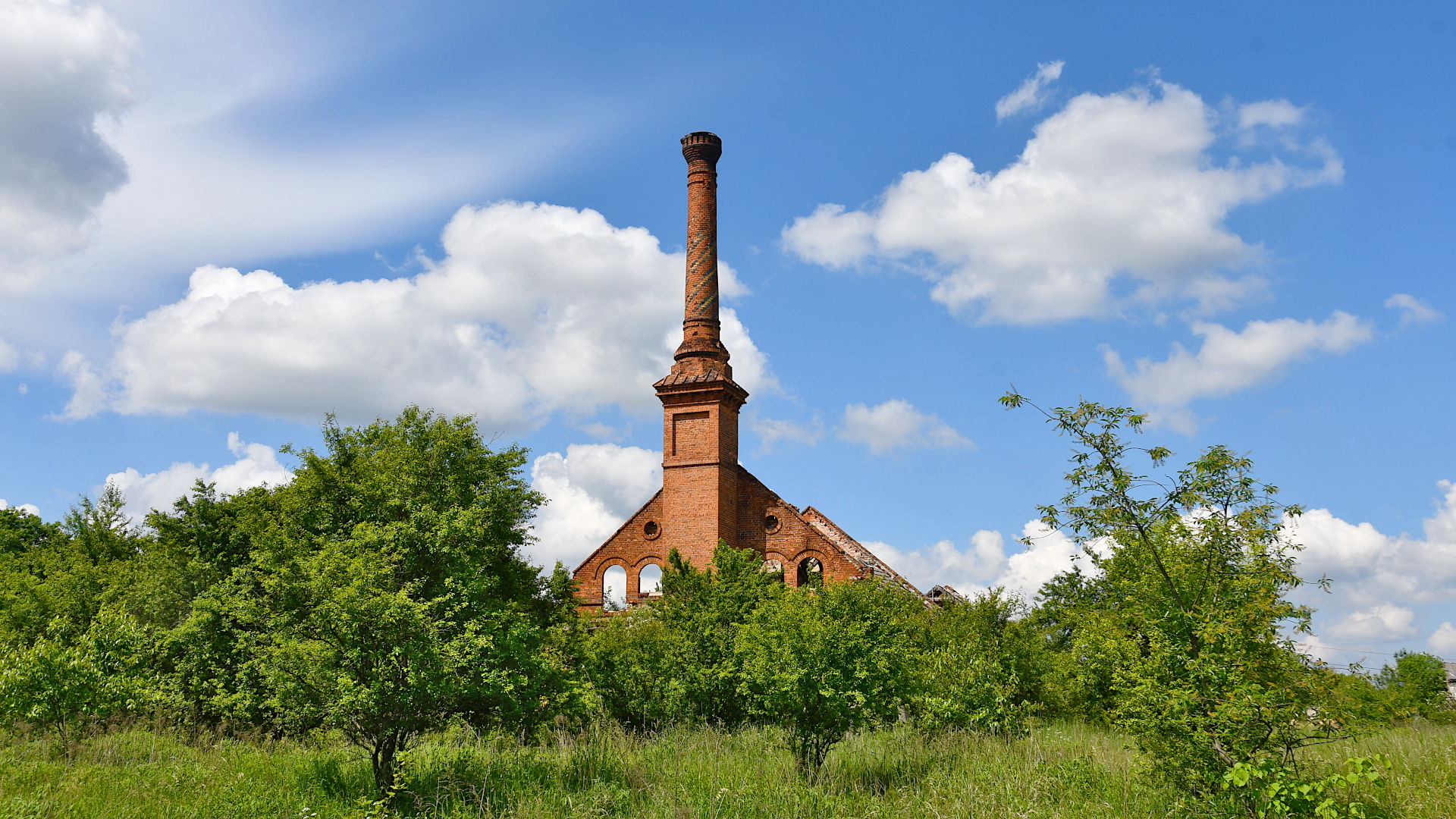 Ruiny dawnego folwarku cysterskiego z zachowanym kominem gorzelni w Rudach-Białym Dworze